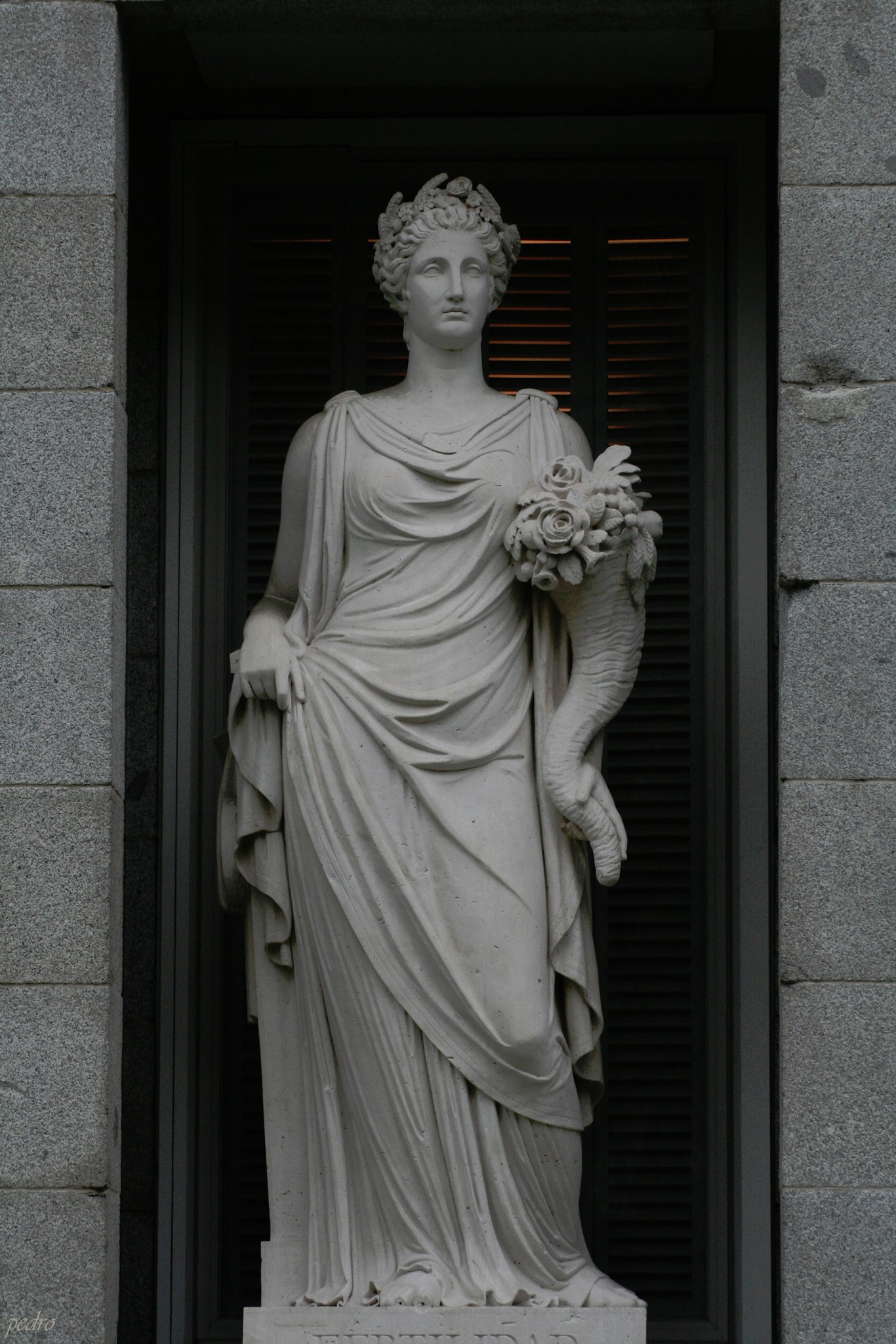 Estatua a la Fertilidad